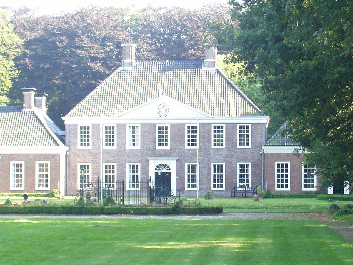 Categorie:Afbeelding havezate